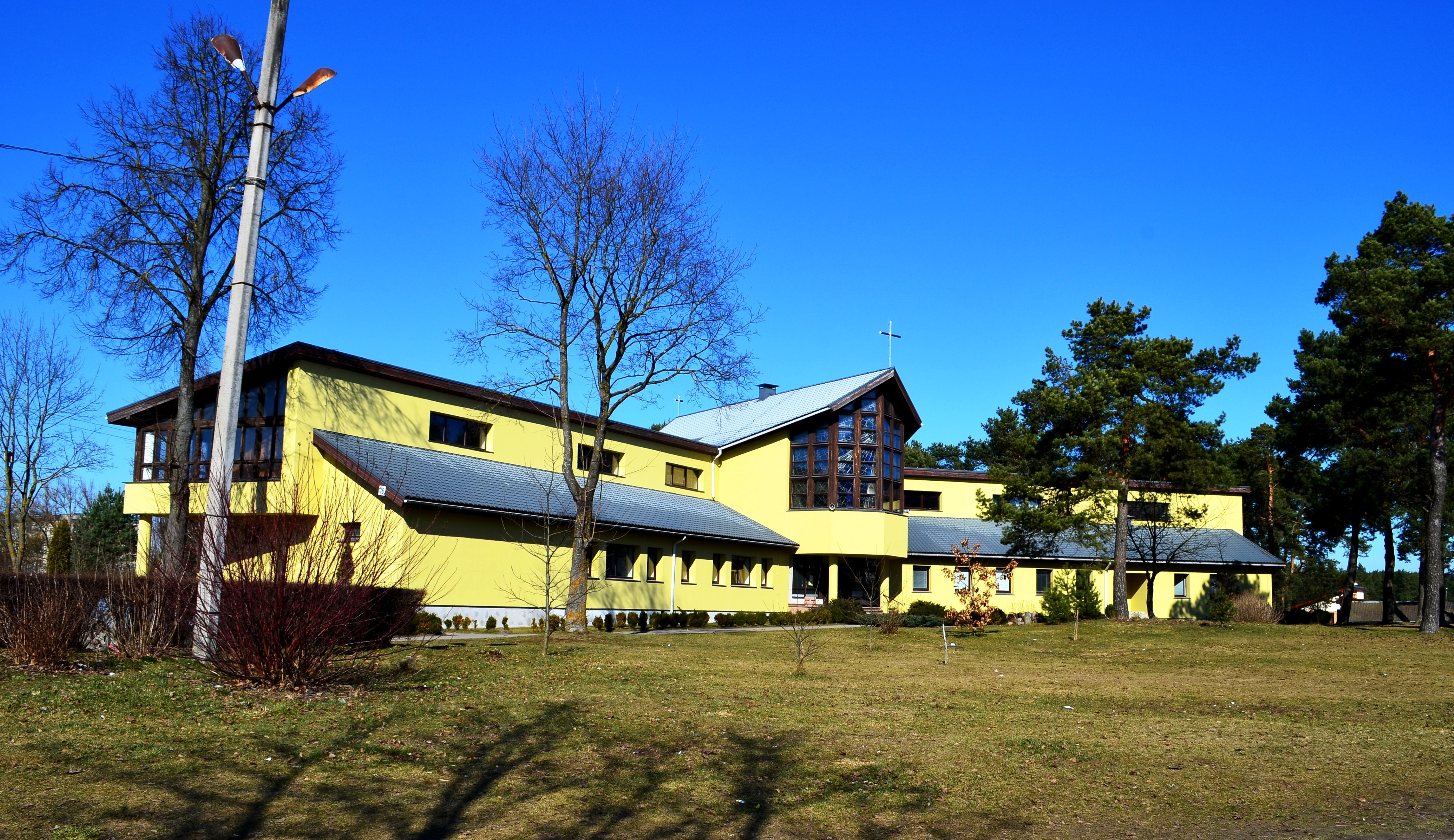 Grigiškių Šventosios Dvasios koplyčia